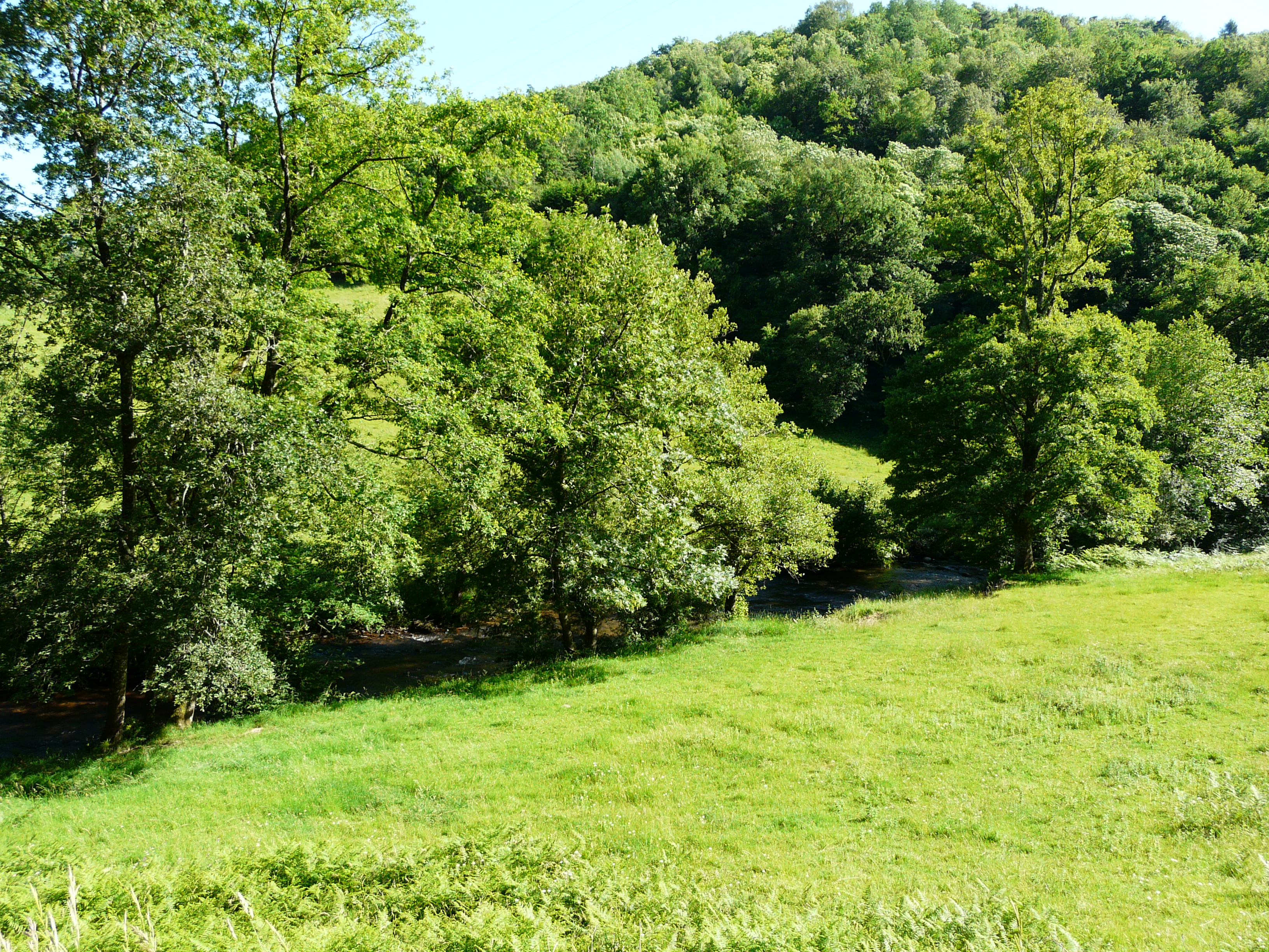 La vallée de la Rouanne le long de la route départementale 14, près du lieu-dit les Rasclies, Dampniat, Corrèze, France